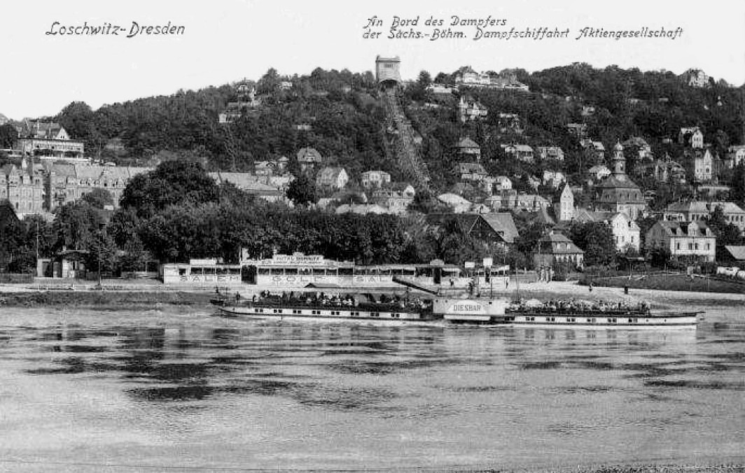 Dampfschiff Diesbar